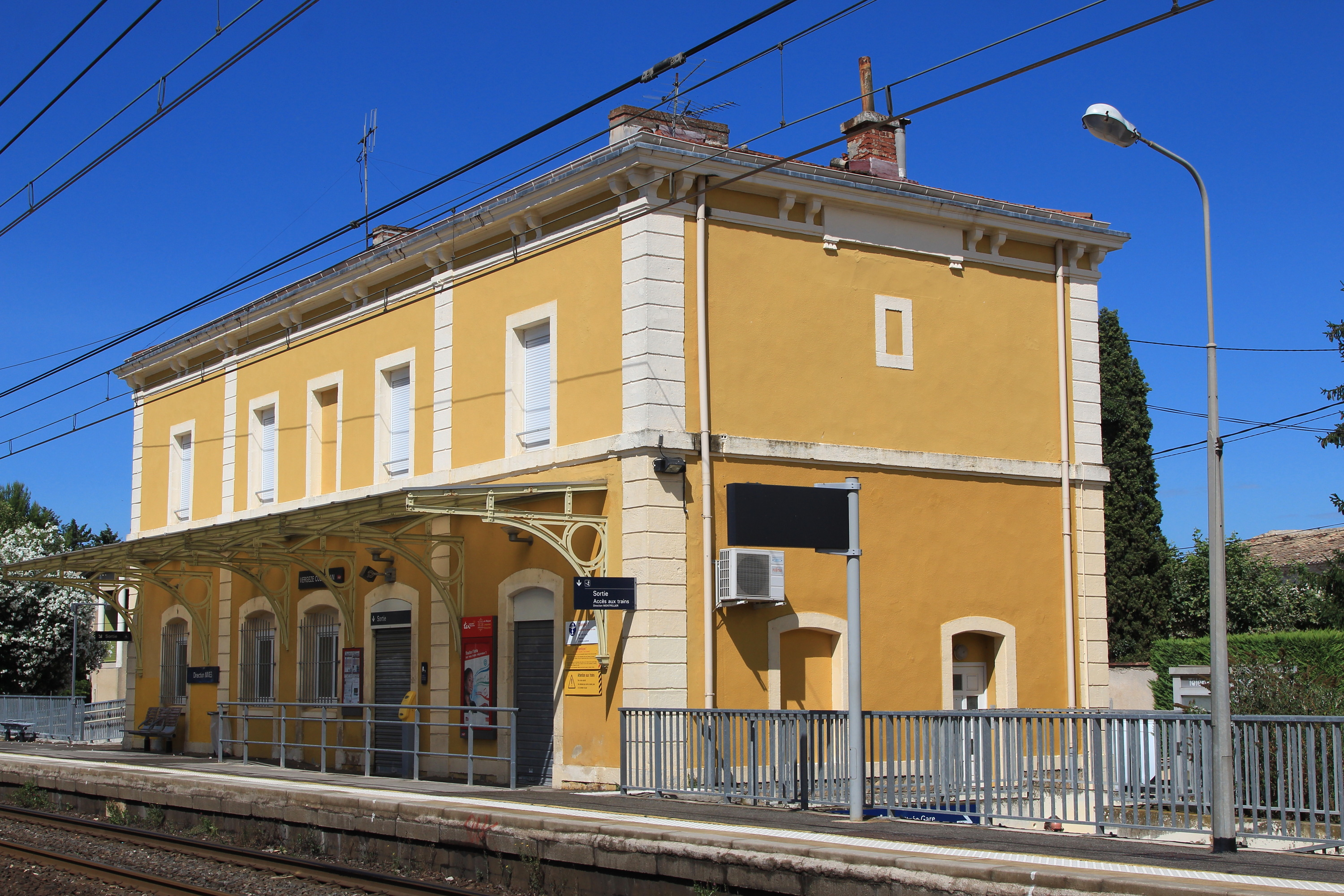 Le bâtiment voyageurs de la gare de Vergèze - Codognan.